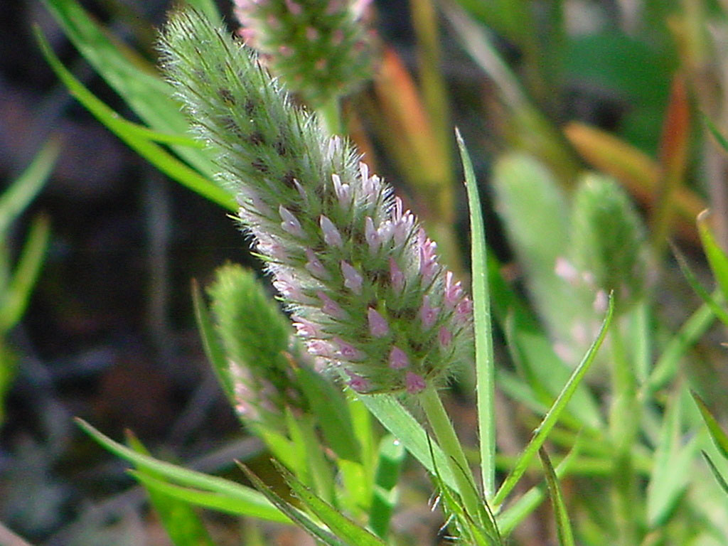 Trèfle à feuilles étroites (Trifolium angustifolium)